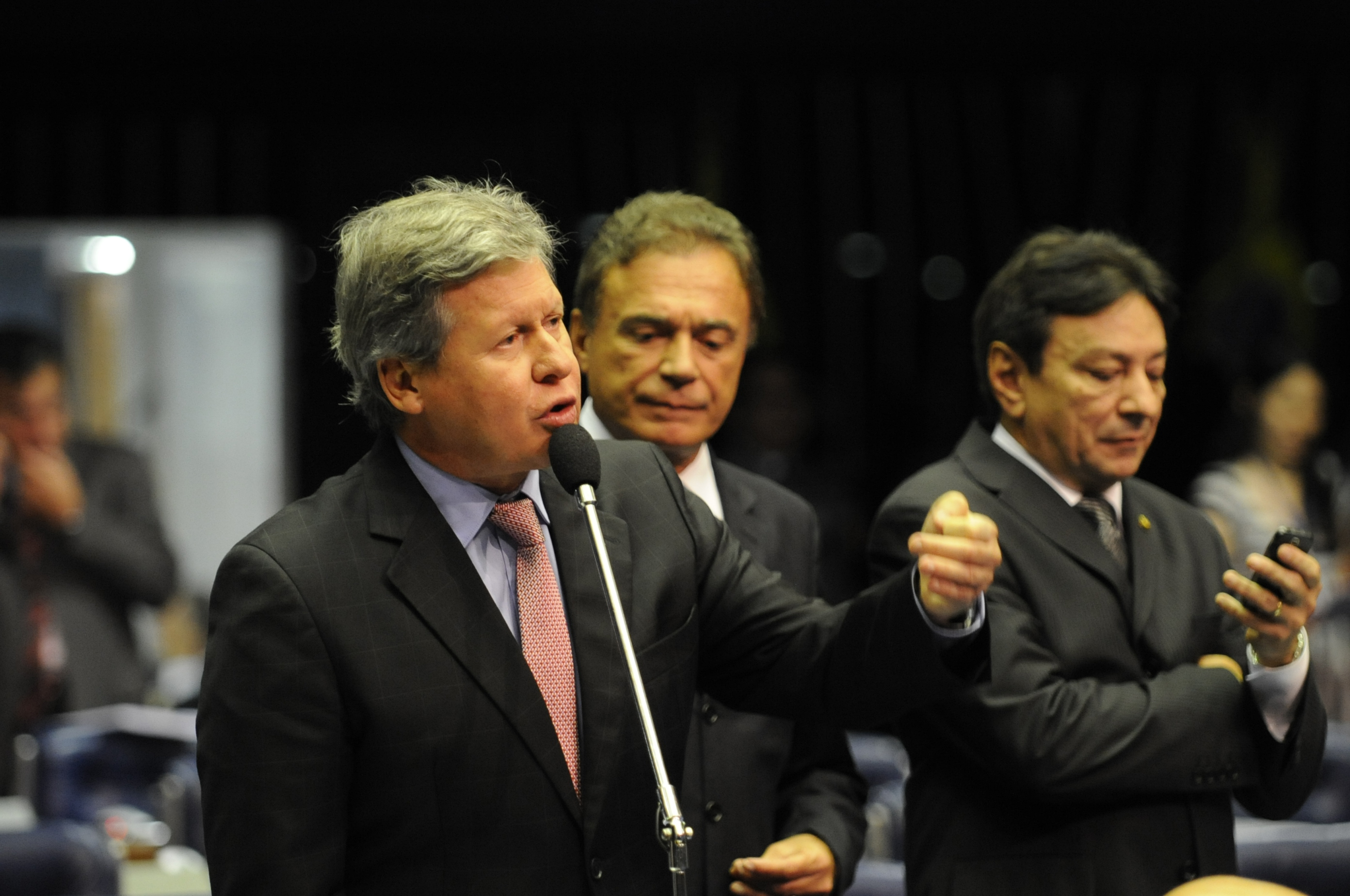 Senador Arthur Virgílio (AM), líder do PSDB, faz uso da palavra, ao lado dos correligionários Alvaro Dias (PR) e Papaléo Paes (AP). Fevereiro de 2010 Foto: Leopoldo Silva